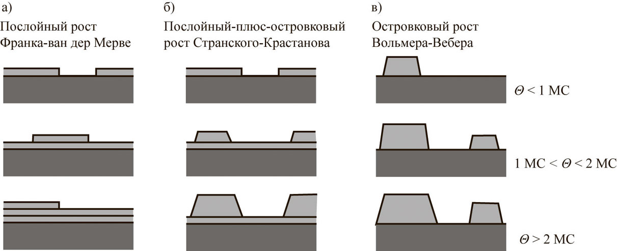 Схематическое представление трех основных механизмов роста пленок. а — послойный рост Франка–ван дер Мерве; б — послойный-плюс-островковый рост Странского–Крастанова; в — островковый рост Вольмера–Вебера. Θ — количество монослоев.